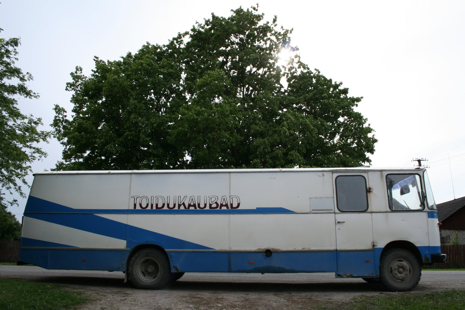 Autolavka Pikevere külas.